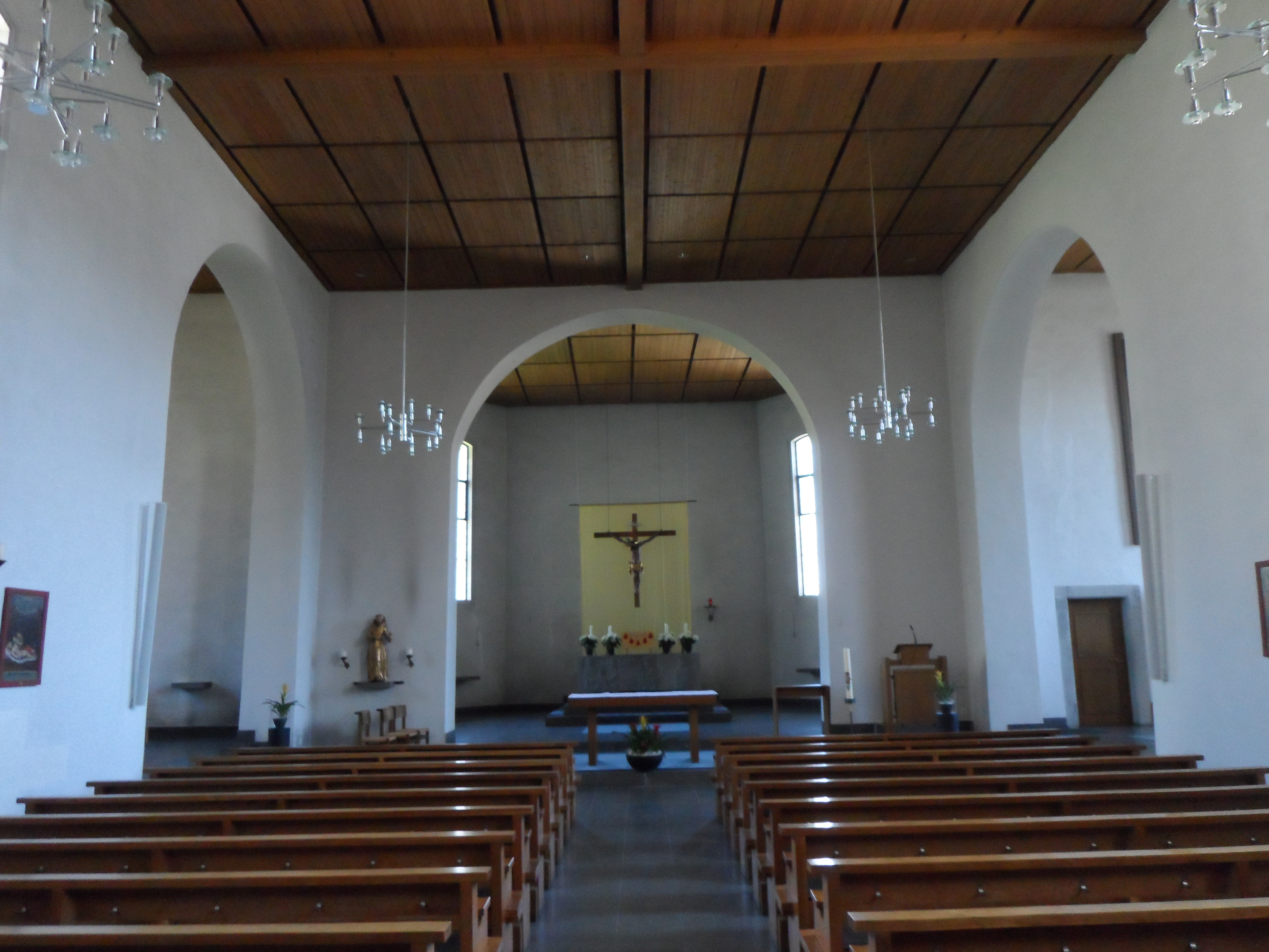 Wallfahrtskirche Heiligkreuz, St. Gallen, Schweiz - Innen